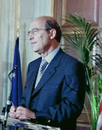 Κώστας Σημίτης